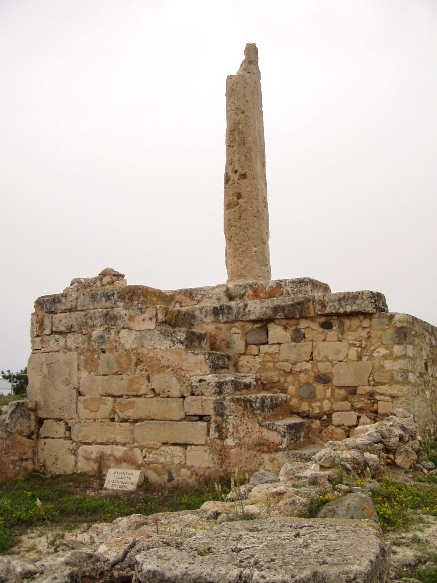 Apollontempel auf Ägina, Blick von Süden auf den Opisthodom